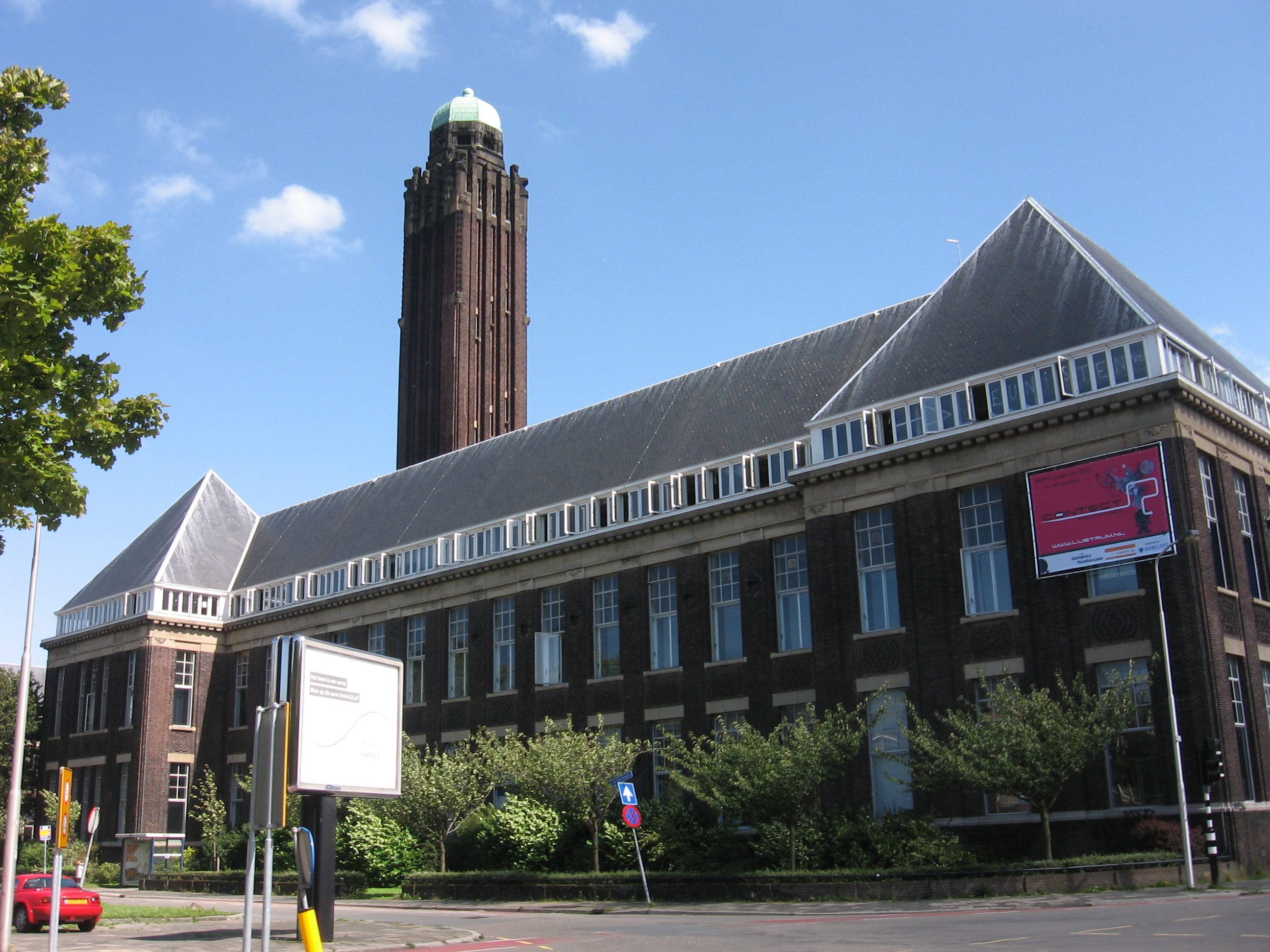 (hoofd)gebouw TU Delft